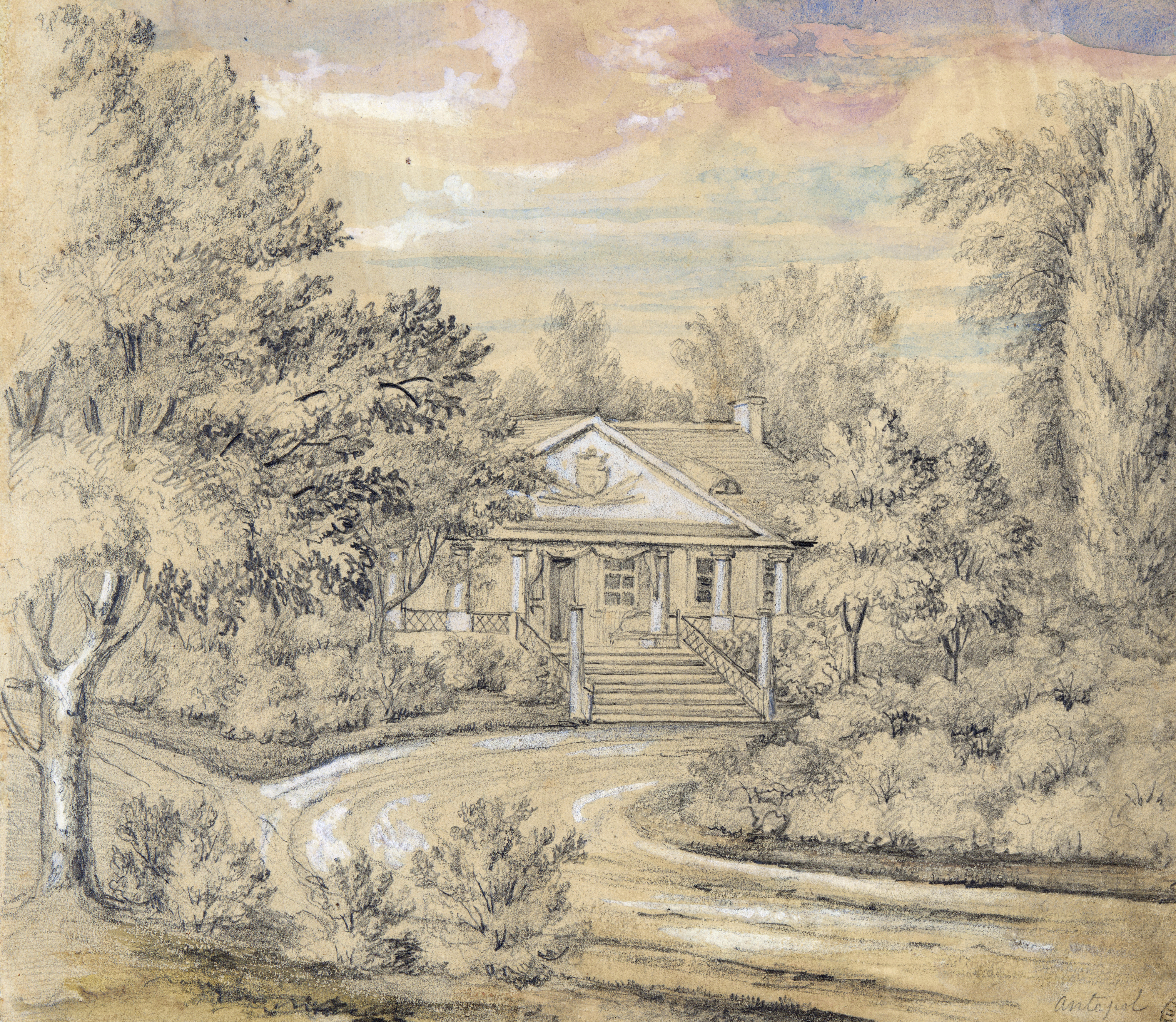 Беларуская (тарашкевіца): Антопаль (Antopal), сядзіба Бравэрнаў (Bravern)